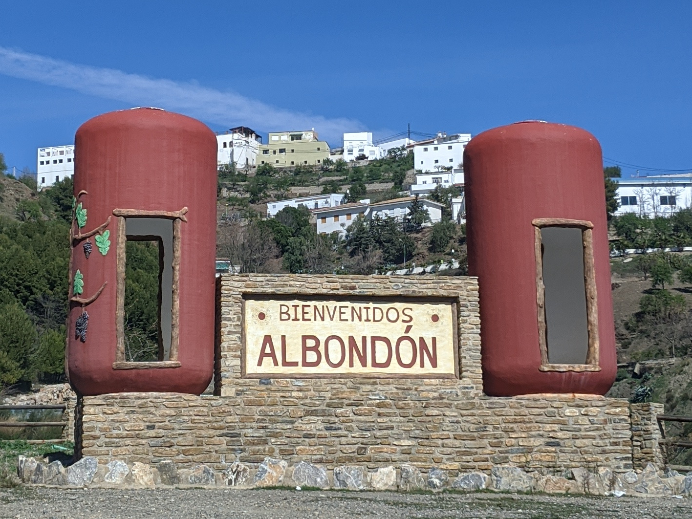 Albondón